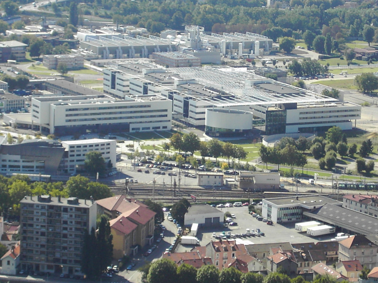 depuis la Bastille de Grenoble : Bâtiments Minatec au premier plan et le LETI au fond.